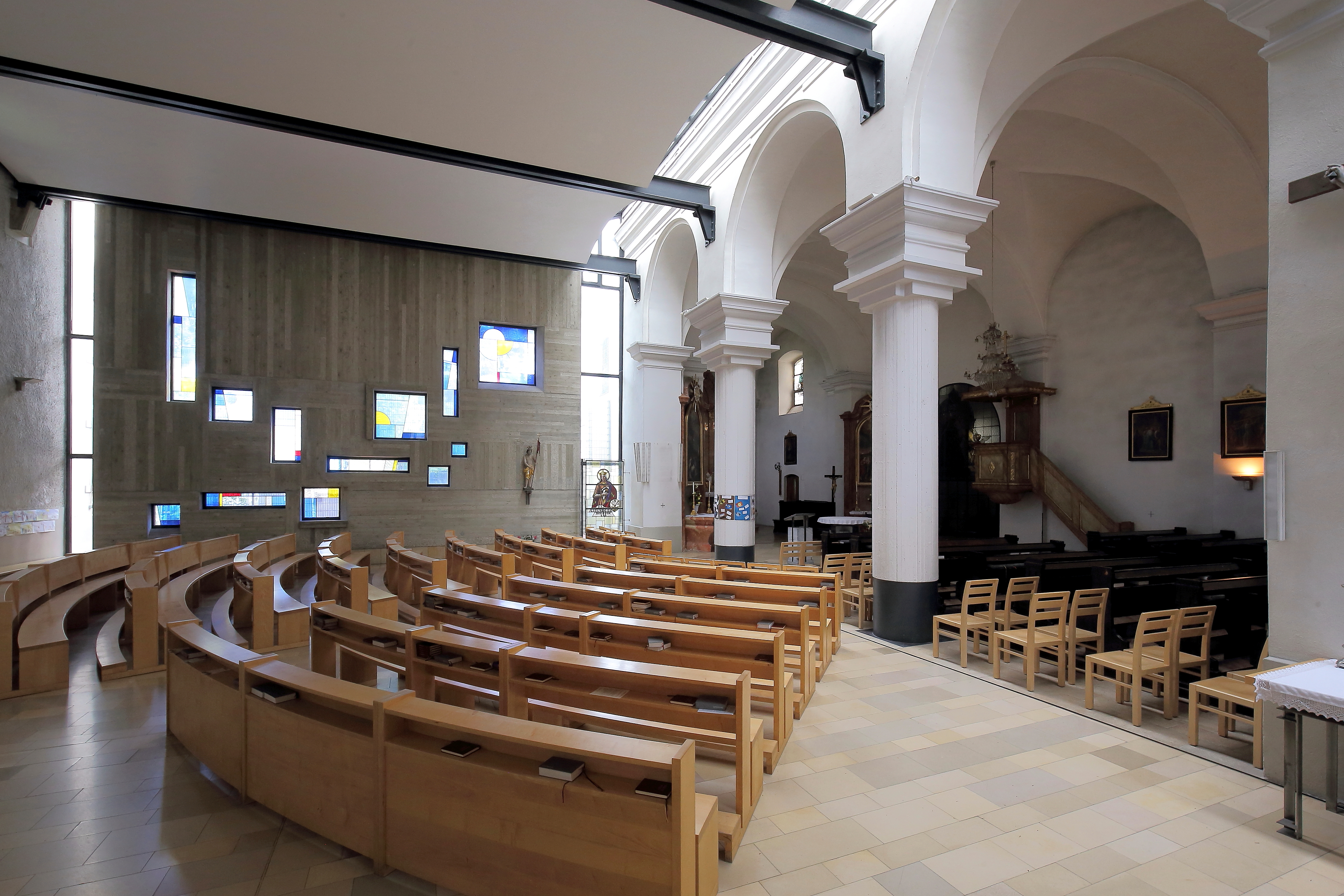 Blick vom Zubau Richtung Altbestand in der Pfarrkirche Aspern.